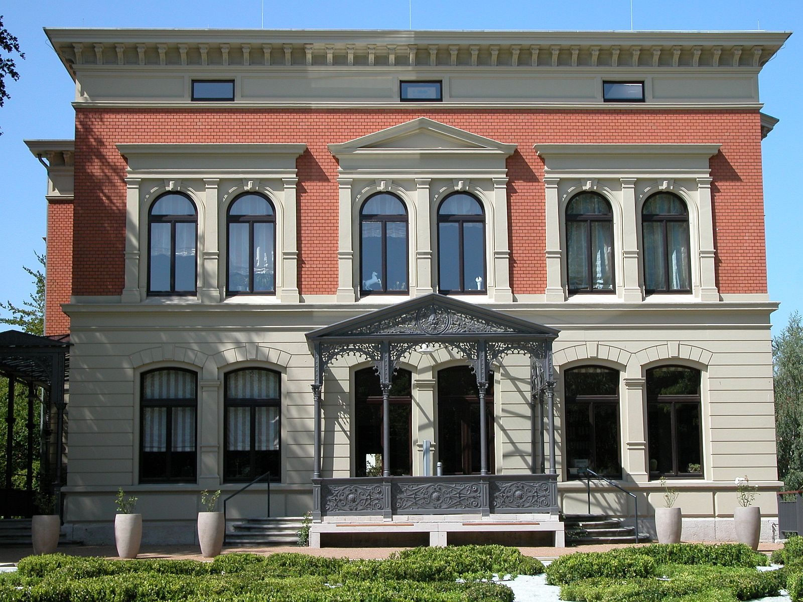 Villa Gerloff, Löwenwall 16 in Braunschweig, heute (2009) das „Haus der Braunschweigischen Stiftungen.